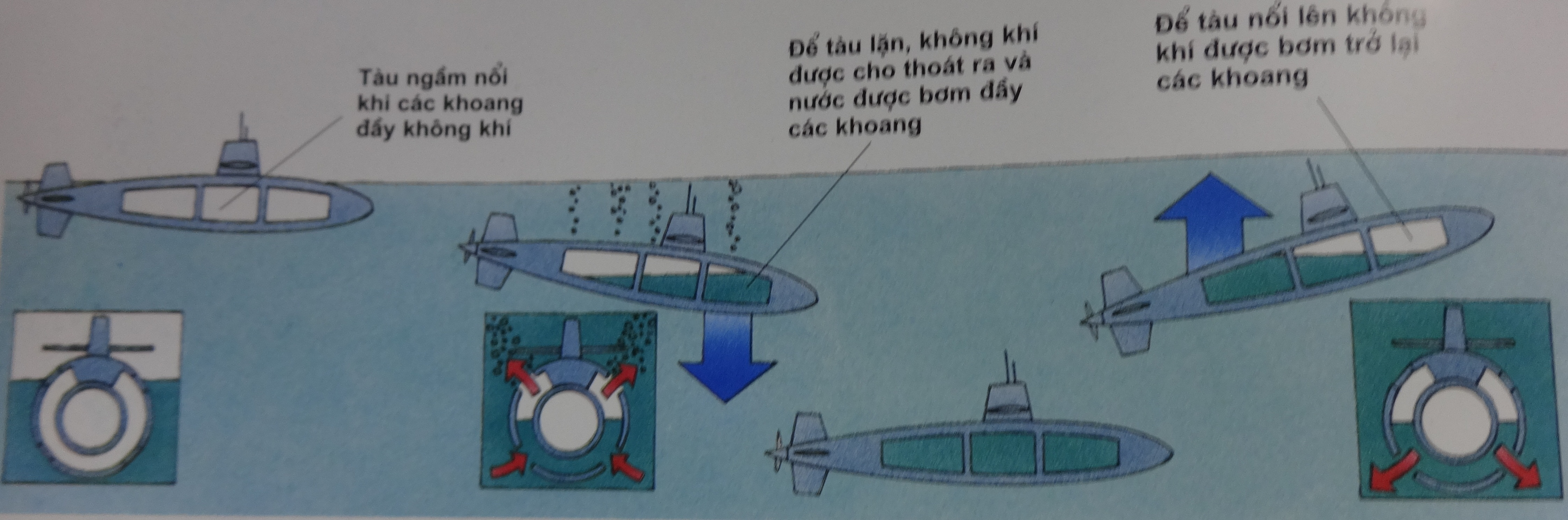 tranh minh họa